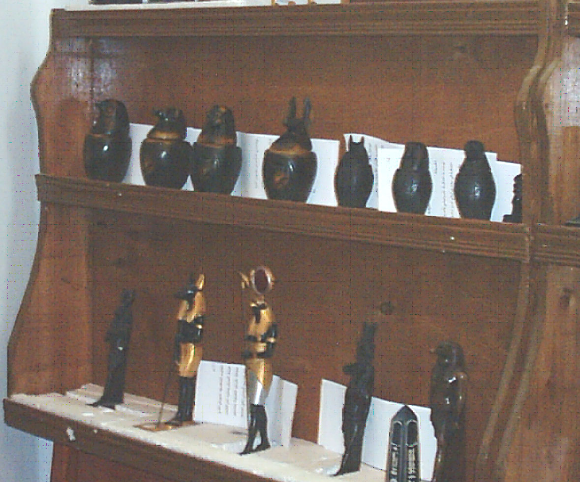 نماذج لبعض معبودات الفراعنة (منتج الصورة Eng_momo86)